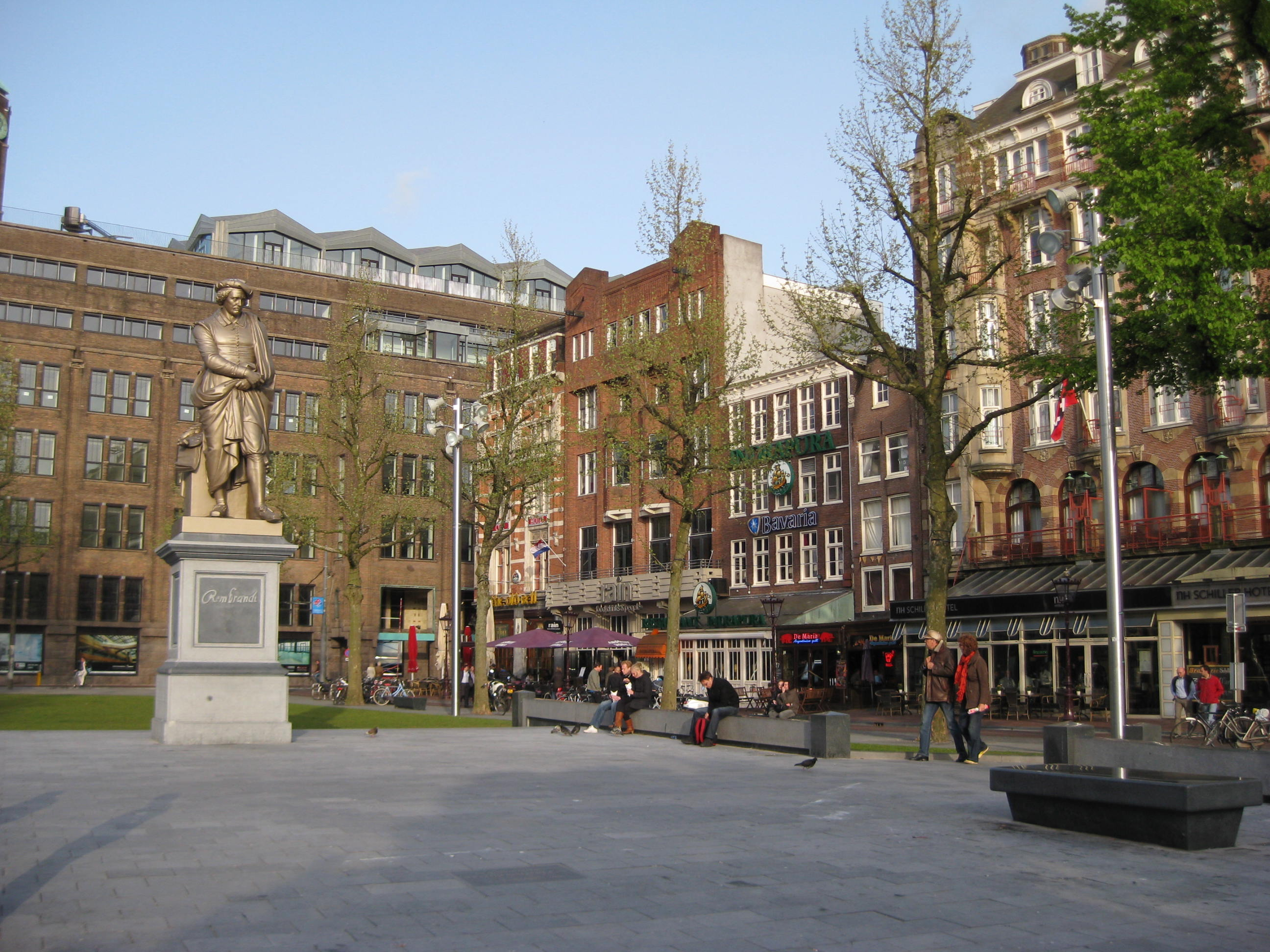 Het Rembrandtplein in Amsterdam, na de herprofilering